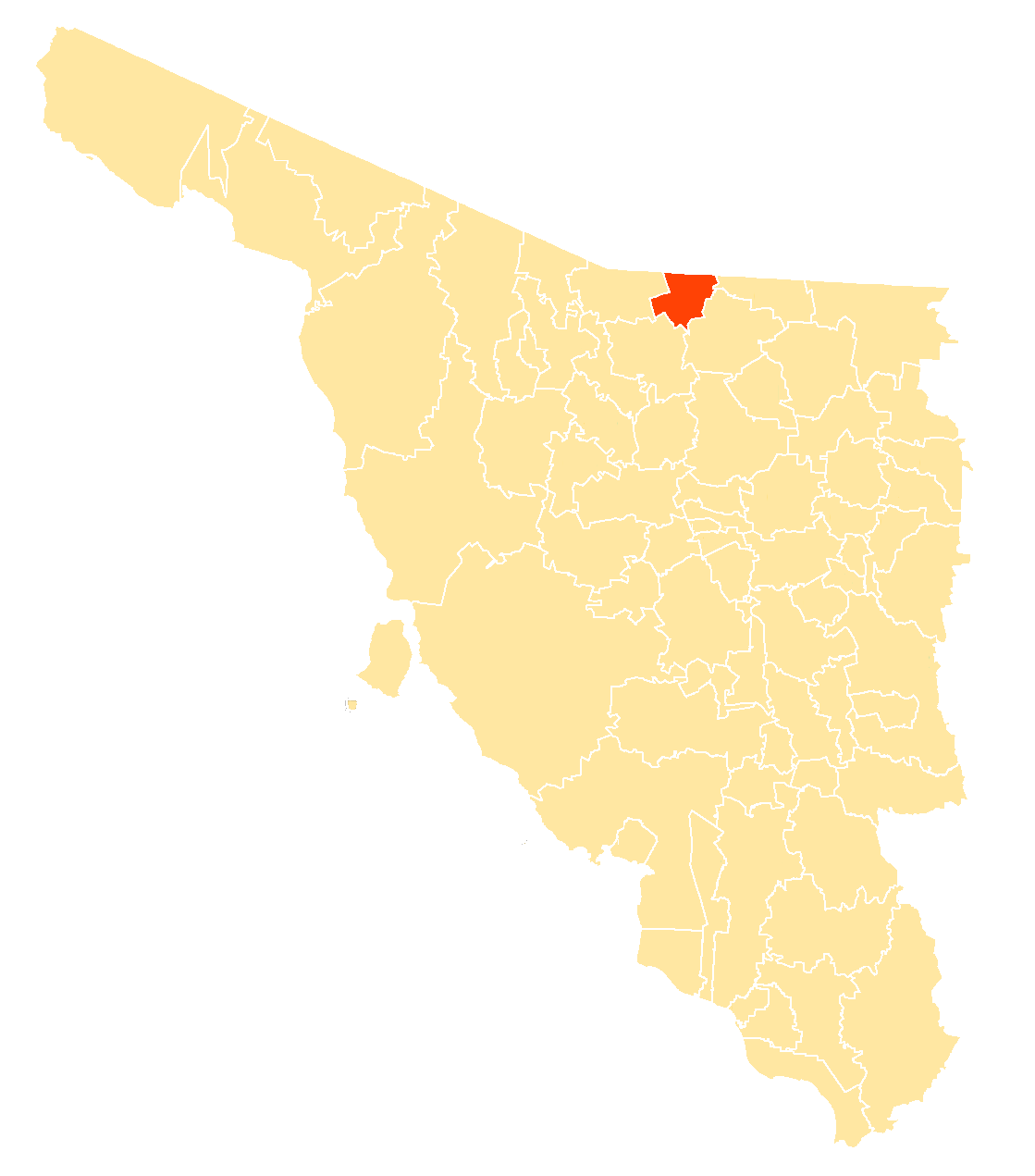 Municipio de Sonora, México.